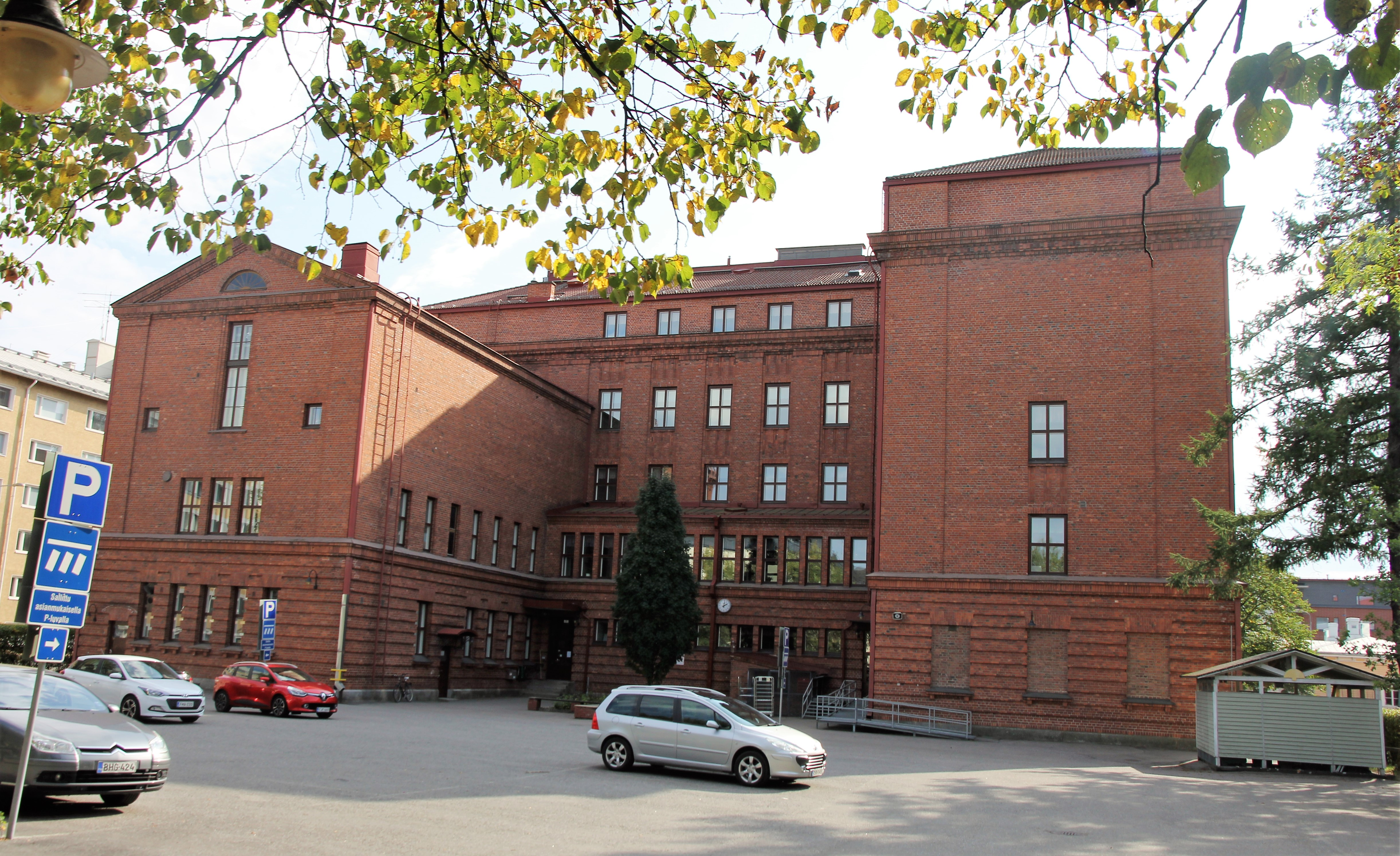 Kallaveden lukion punatiilirakennus Piispanpuiston pohjoislaidalla, osoitteessa Maaherrankatu 2, Kuopion Väinälänniemen kaupunginosassa.